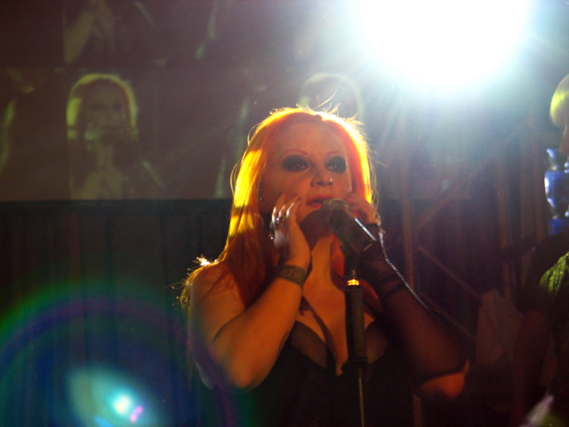 Olvido Gara, Alaska, al micrófono, cantando en una actuación de Fangoria